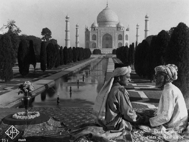 Image promotionnelle de Shiraz (1928). Himansu Rai et Charu Roy